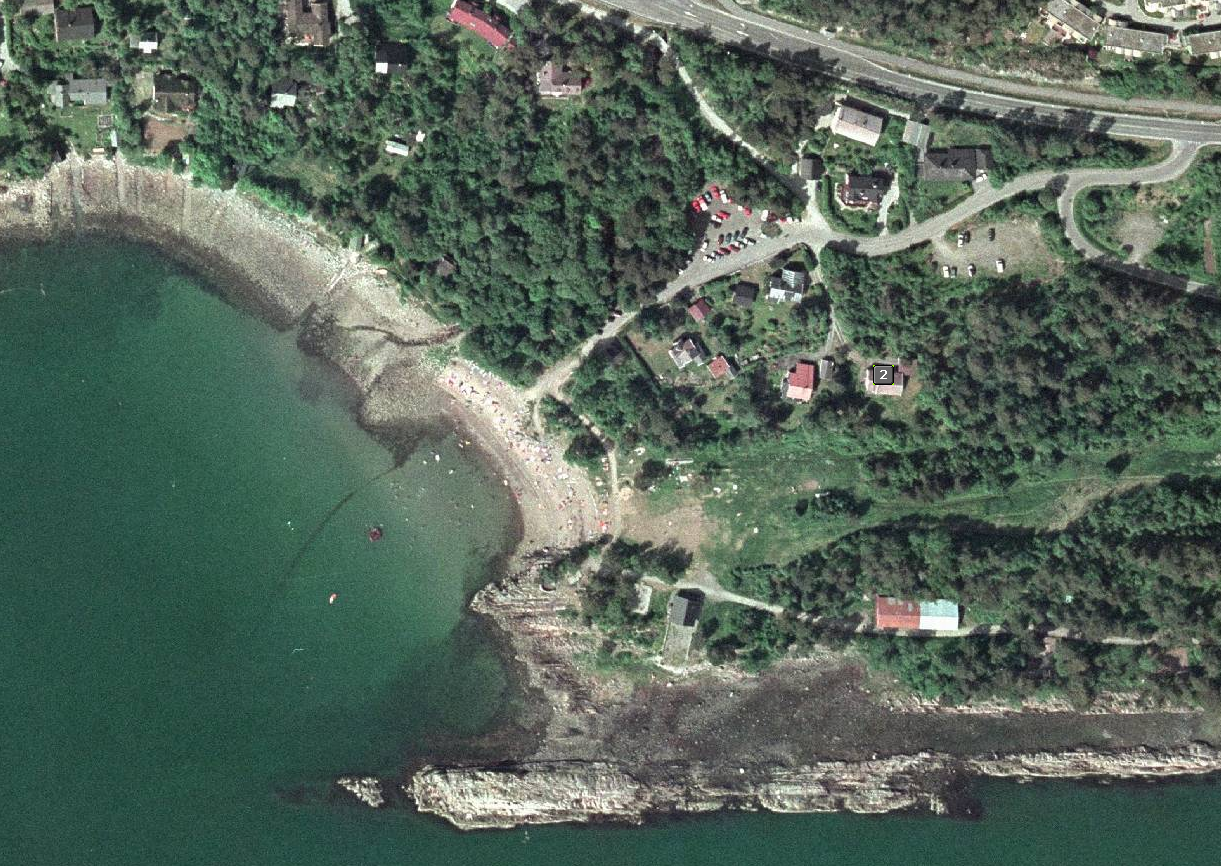 Kringstadbukta i Molde